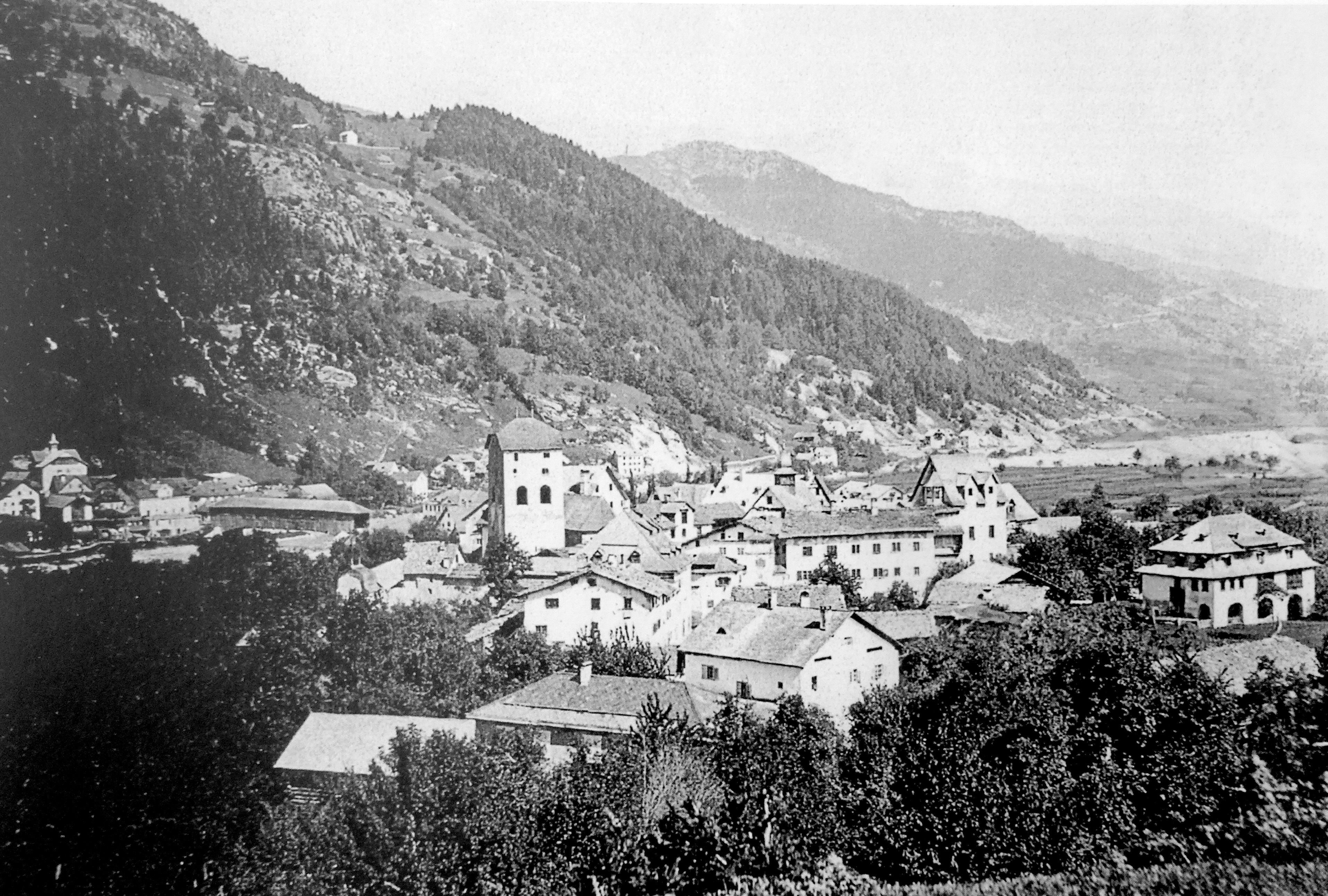 Ilanz1870 von Südwesten, die erste bekannte Aufnahme von Ilanz